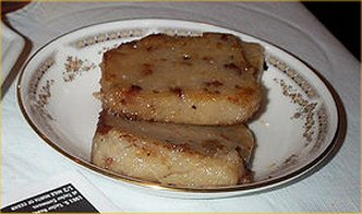 Taro cake